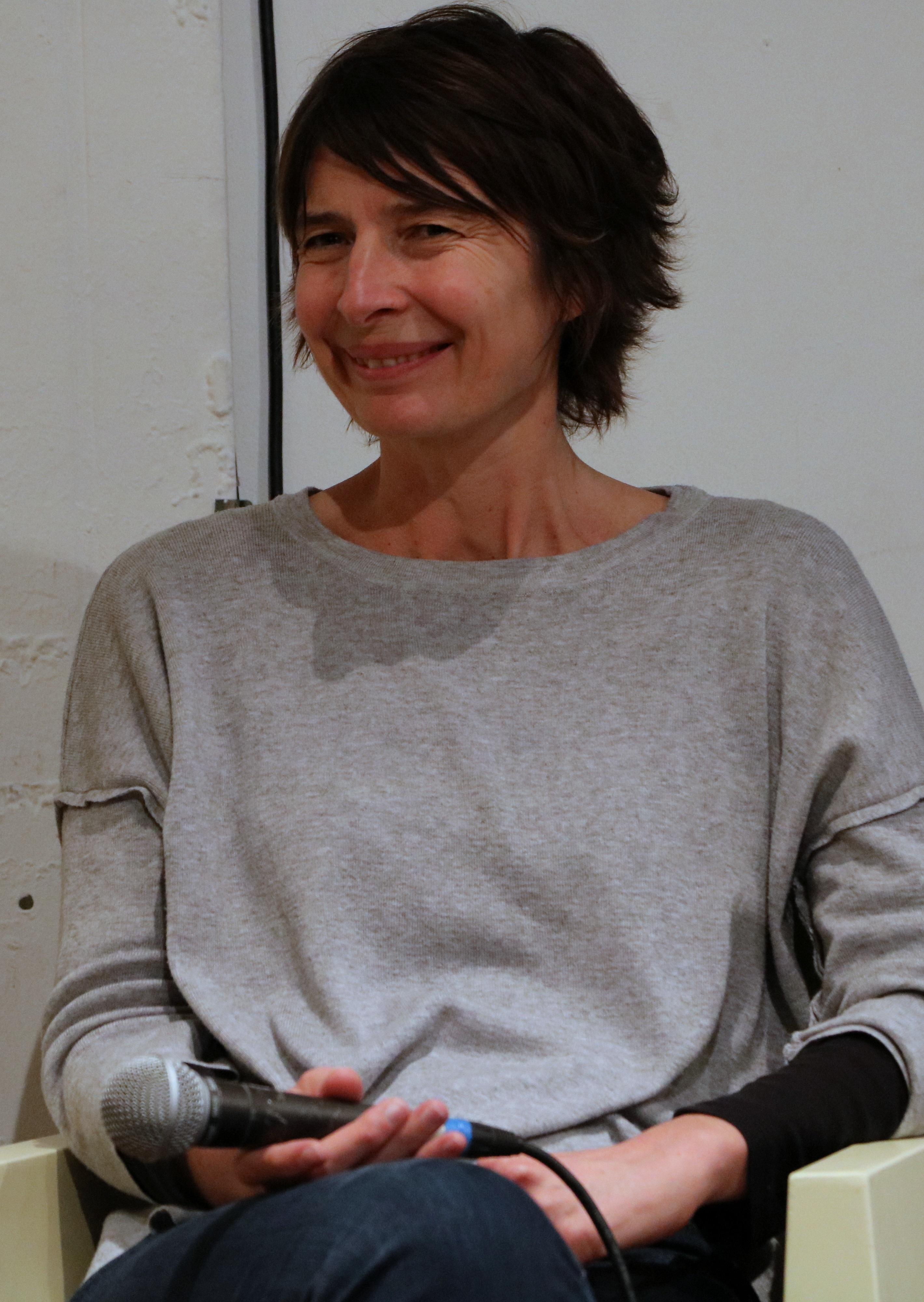 Lucile Bordes - Festival Atlantide - Lieu Unique - Nantes - 3 mars 2017